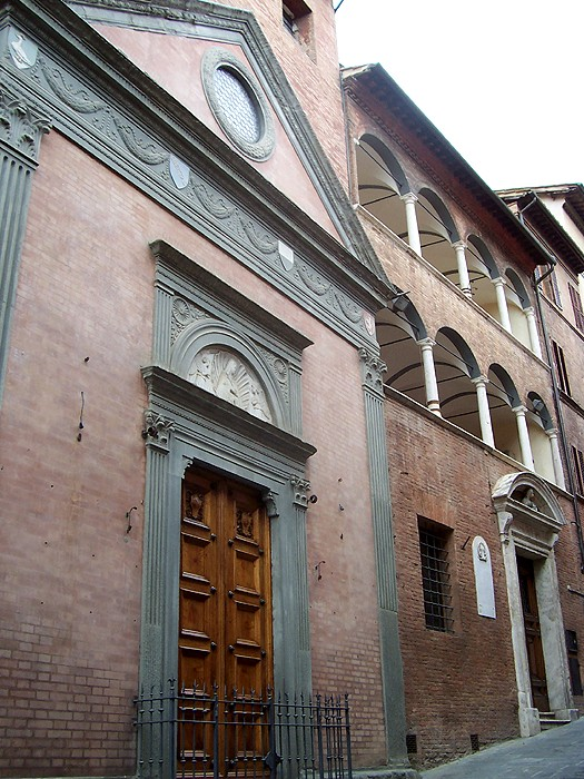 Siena - Santuario della Casa di S. Caterina (Oratorio di S. Caterina in Fontebranda)